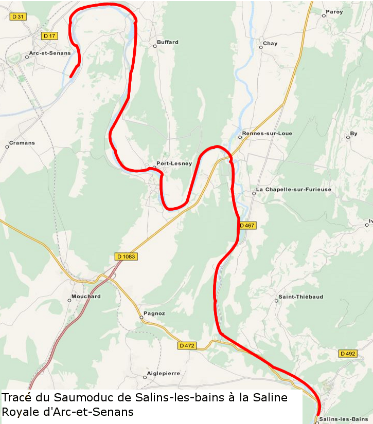 Tracé du saumoduc de Salins-les-bains à la saline royale d'Arc-et-Senans